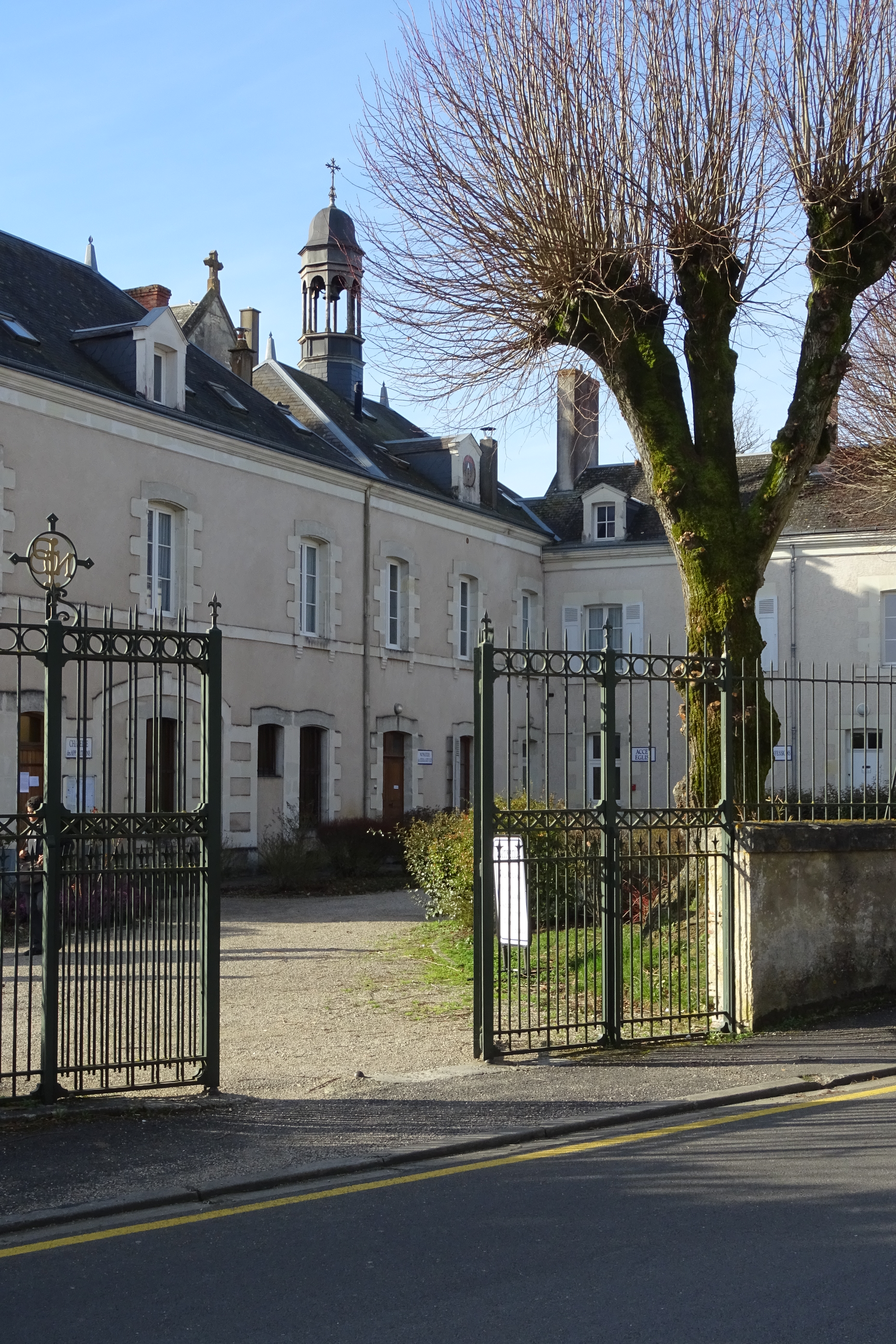 La maison et la chambre des apparitions, le couvent des sœurs contemplatives et l'aile en retour de l'hôtellerie Saint Dominique depuis le portail principal.